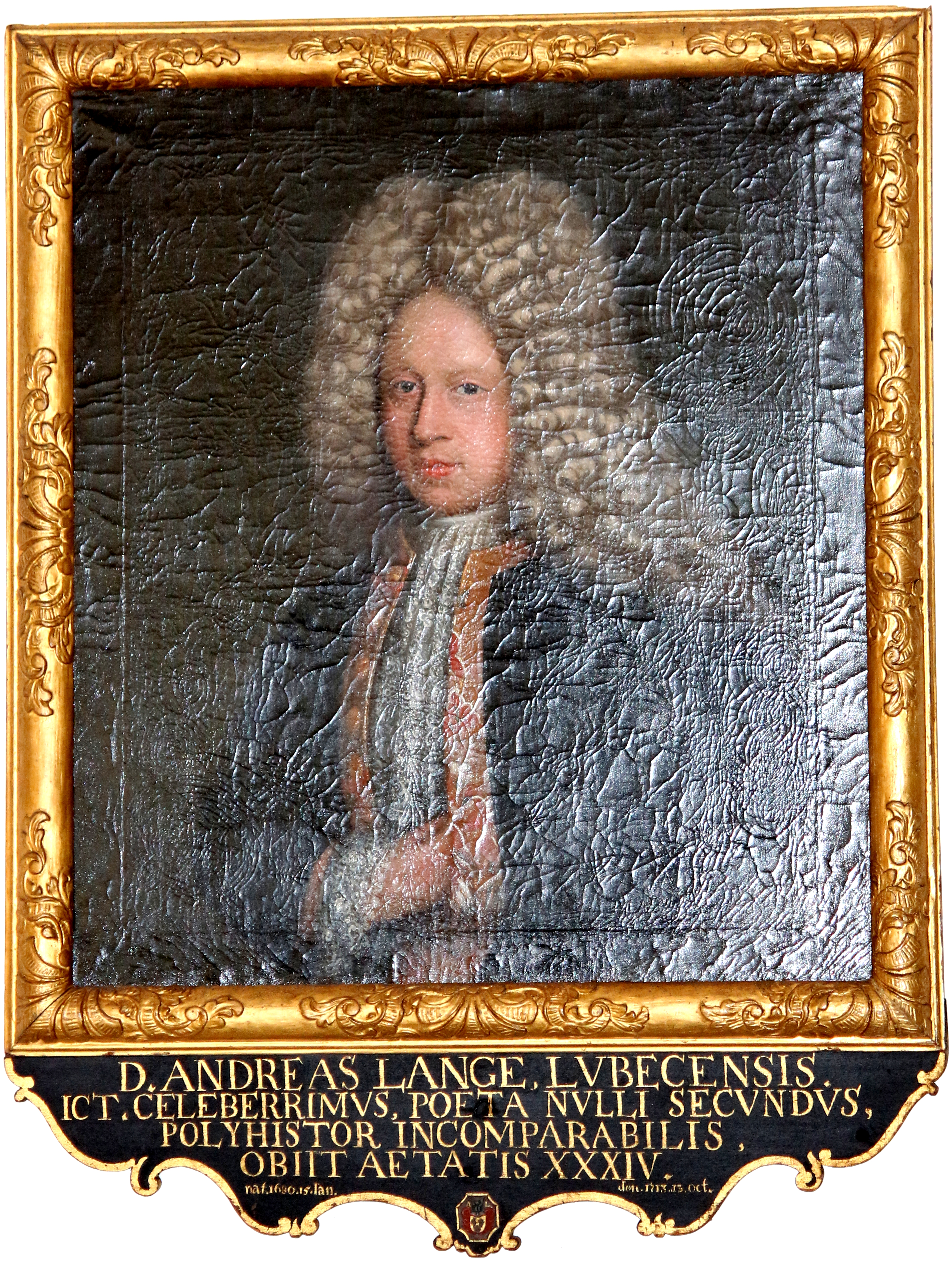 Andreas Lange - Gemälde in der Stadtbibliothek Lübeck